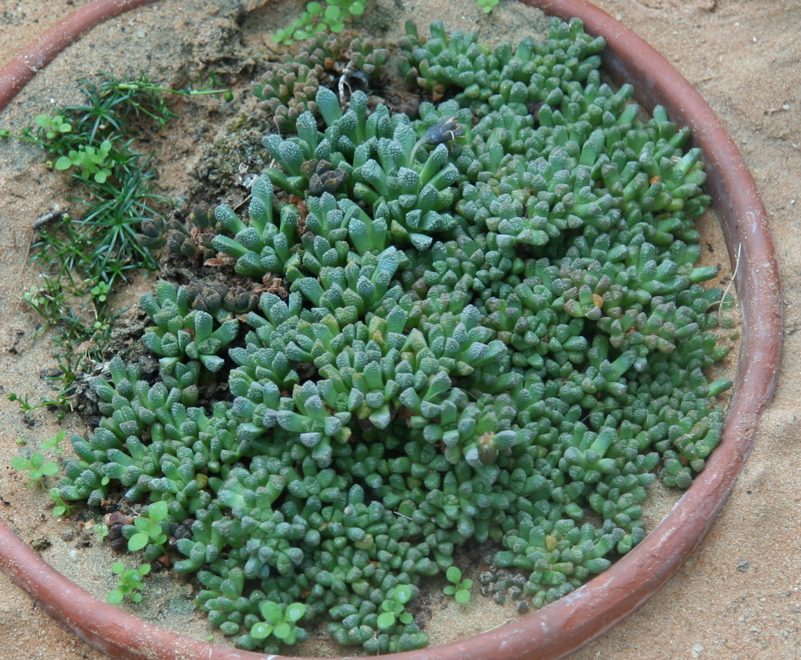 Neohenricia sibbettii im Botanischen Garten Hamburg